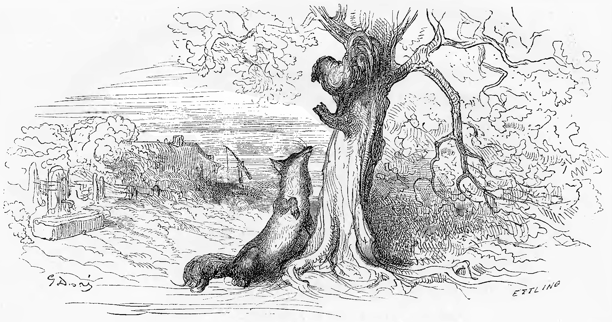 grafika z książki PL Bajki, Jean de La Fontaine, nakładem i drukiem Jana Noskowskiego, Warszawa 1876